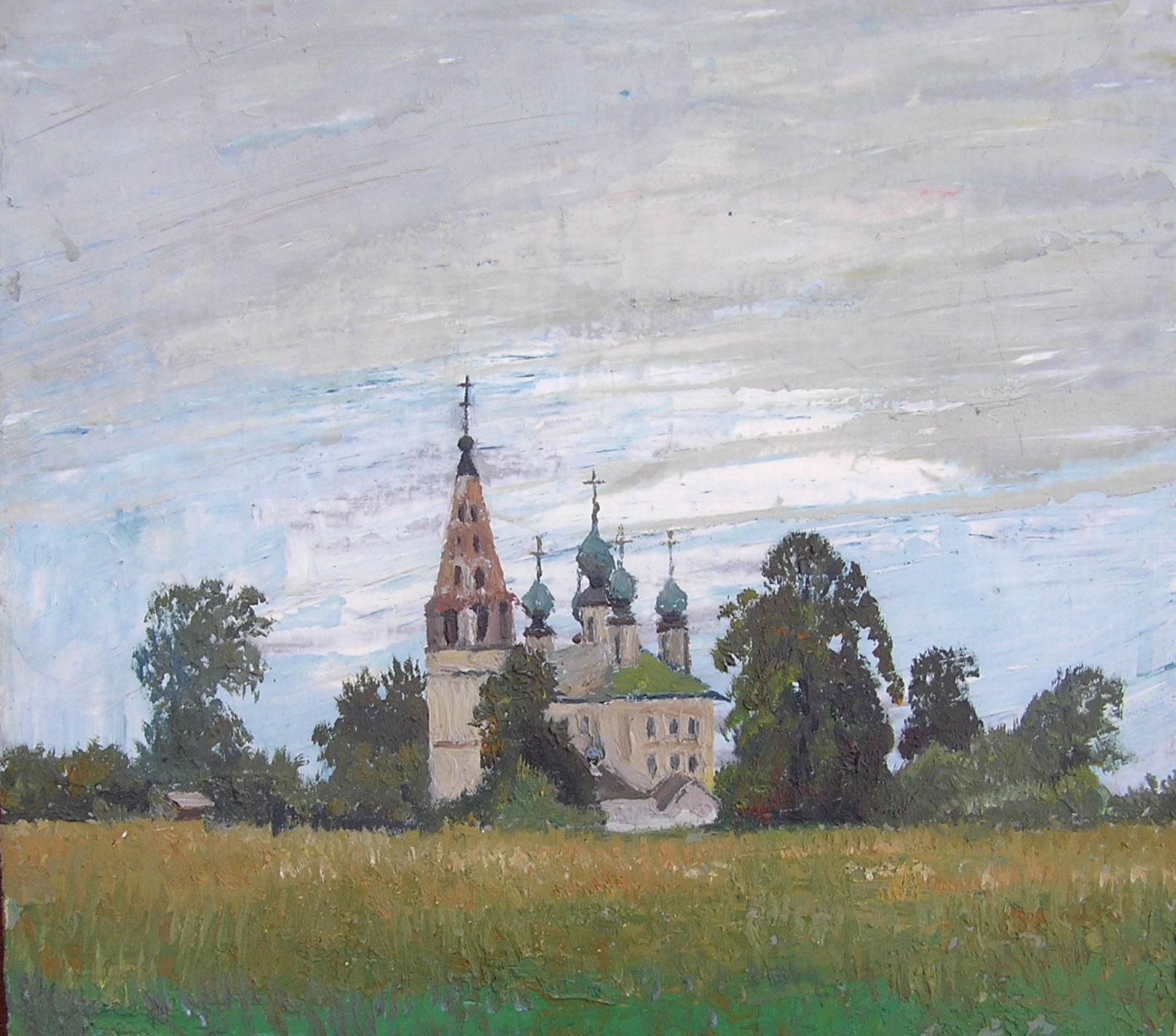 Палех, 1978.